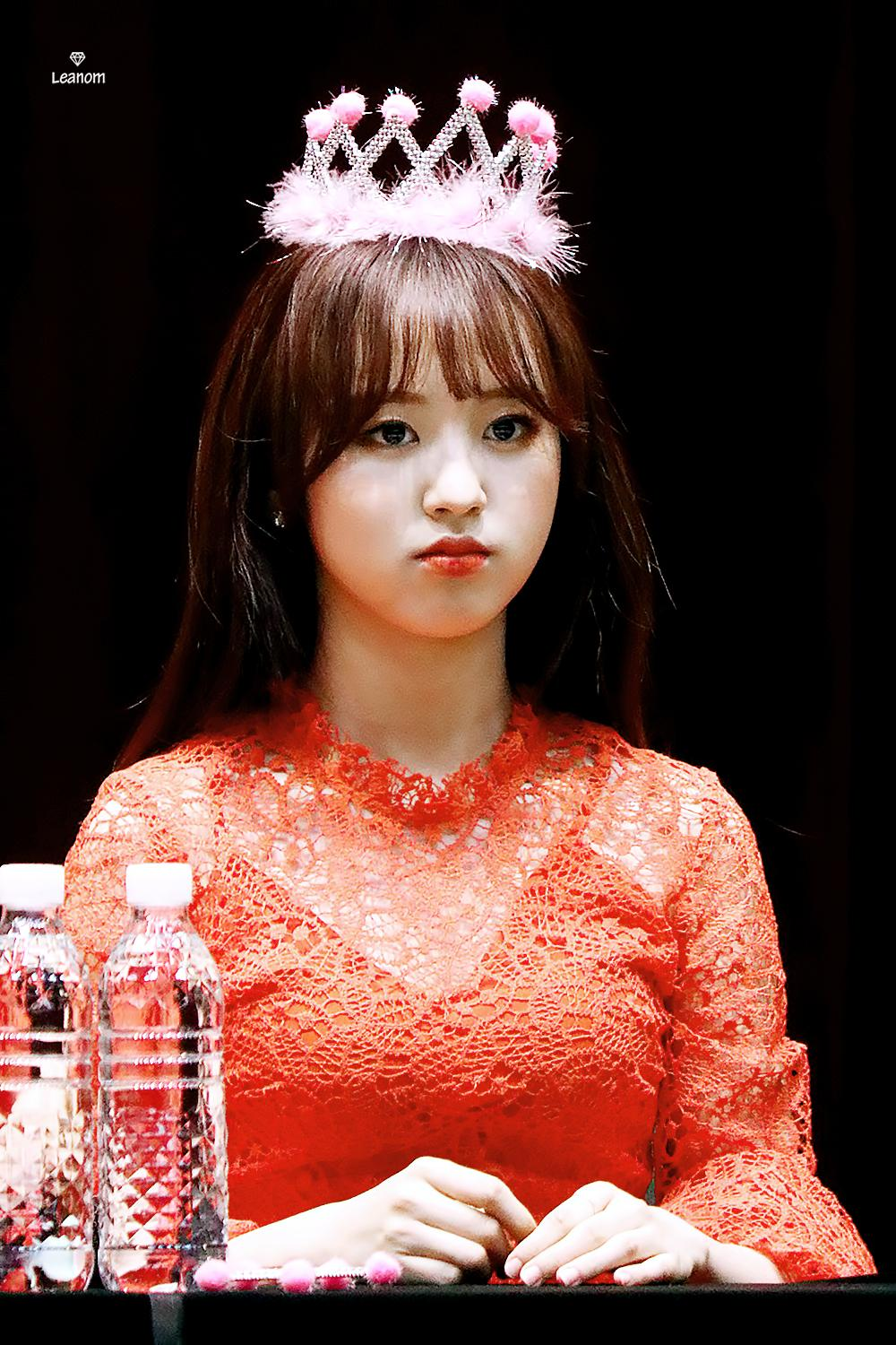 180602 유니티 목동 팬싸인회